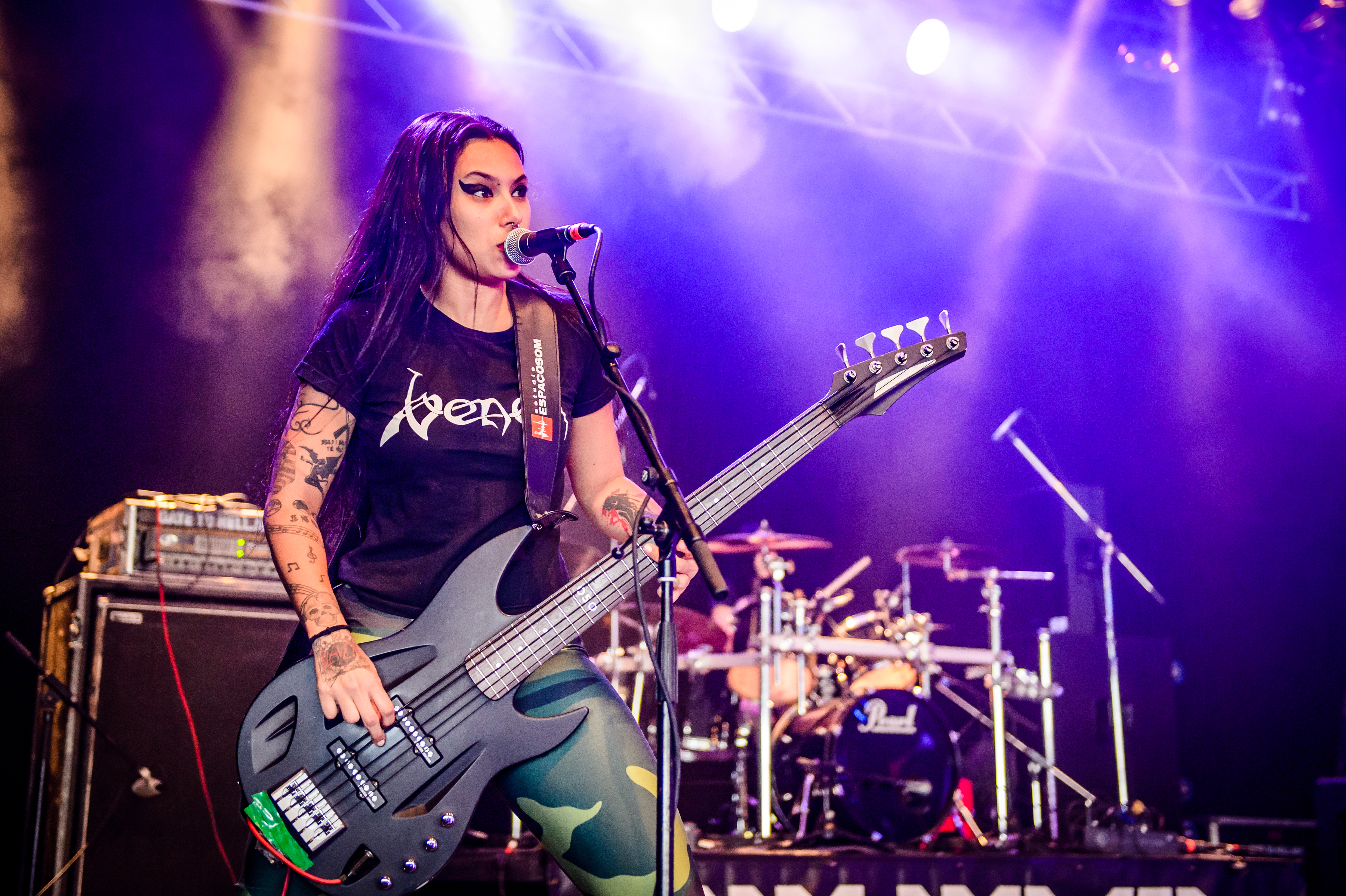 'Dong Open Air 2017; Neukirchen-Vluyn': 'Nervosa'